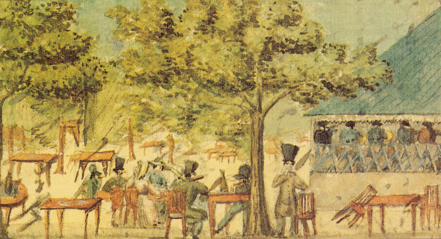 Der Musikpavillon im Kuchengarten zu Reudnitz bei Leipzig, Aquarell